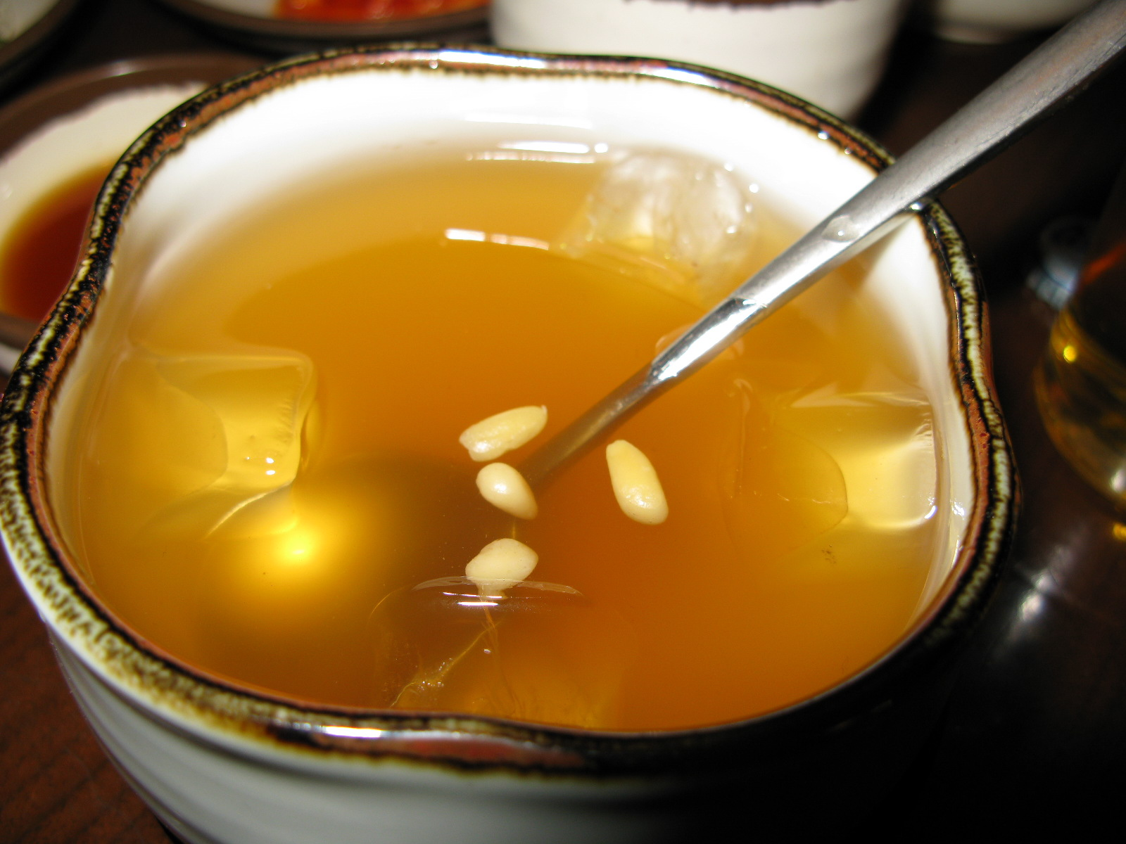 Ice Plum tea Korea